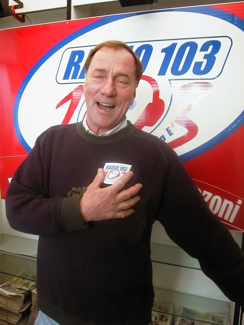 Roberto Arnaldi, Festival di Sanremo (2000), postazione esterna di Radio 103